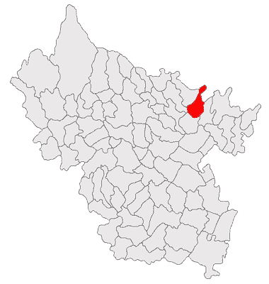 Categorie:Hărţi ale judeţului Buzău